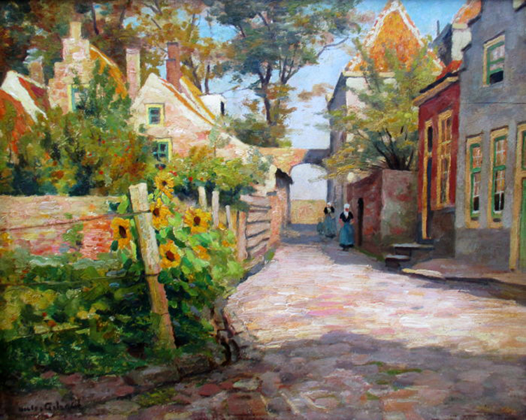 Dorpszicht van Veere Zeeland met personages